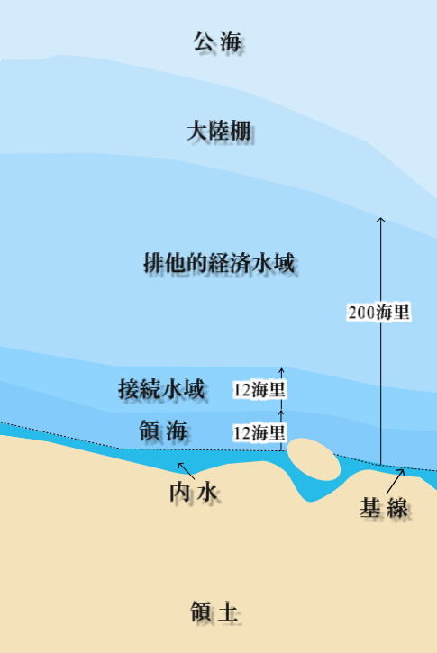 国際法における水域名